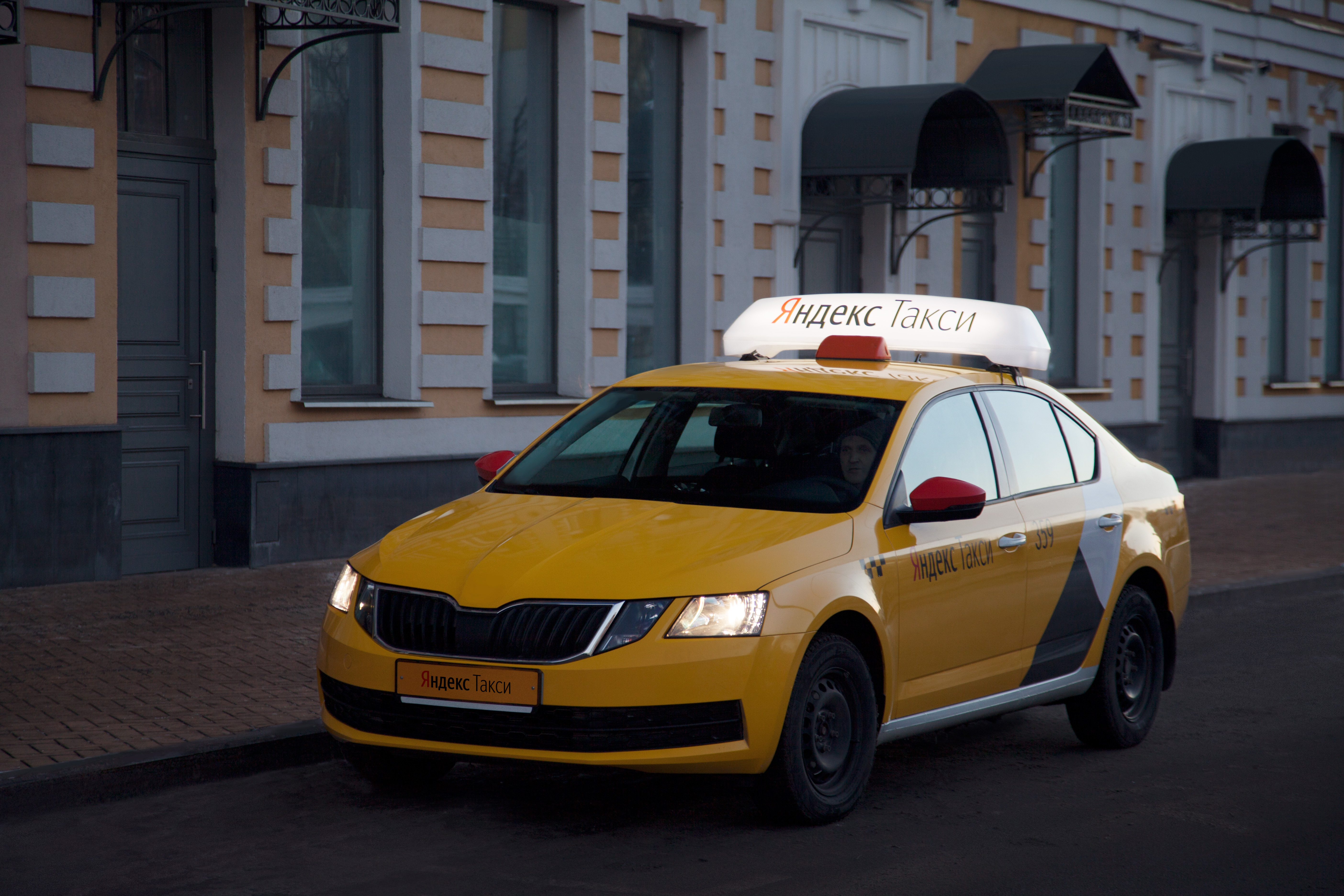 Автомобиль такси, брендированный сервисом Яндекс.Такси